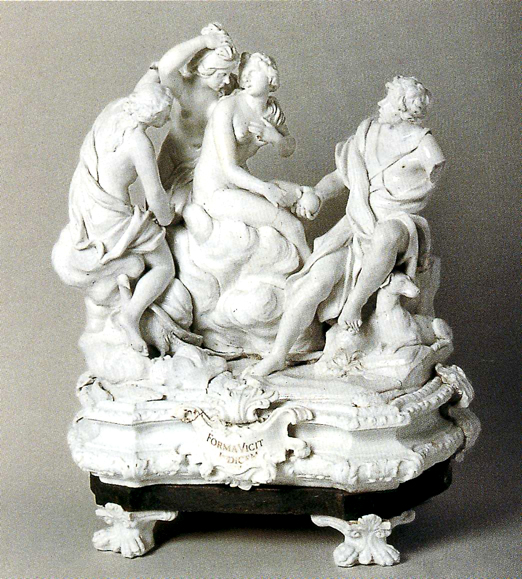 Il Giudizio di Paride. Gruppo in porcellana. Ginori a Doccia 1745-1750 c.